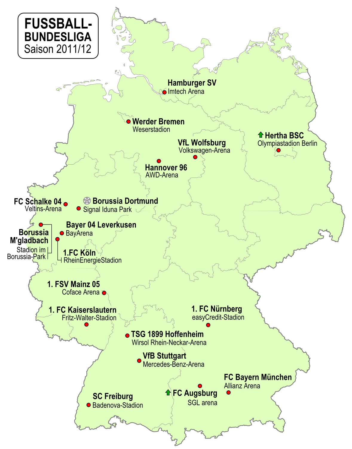 Karte der Vereine der Fußball-Bundesliga-Saison 2011/2012